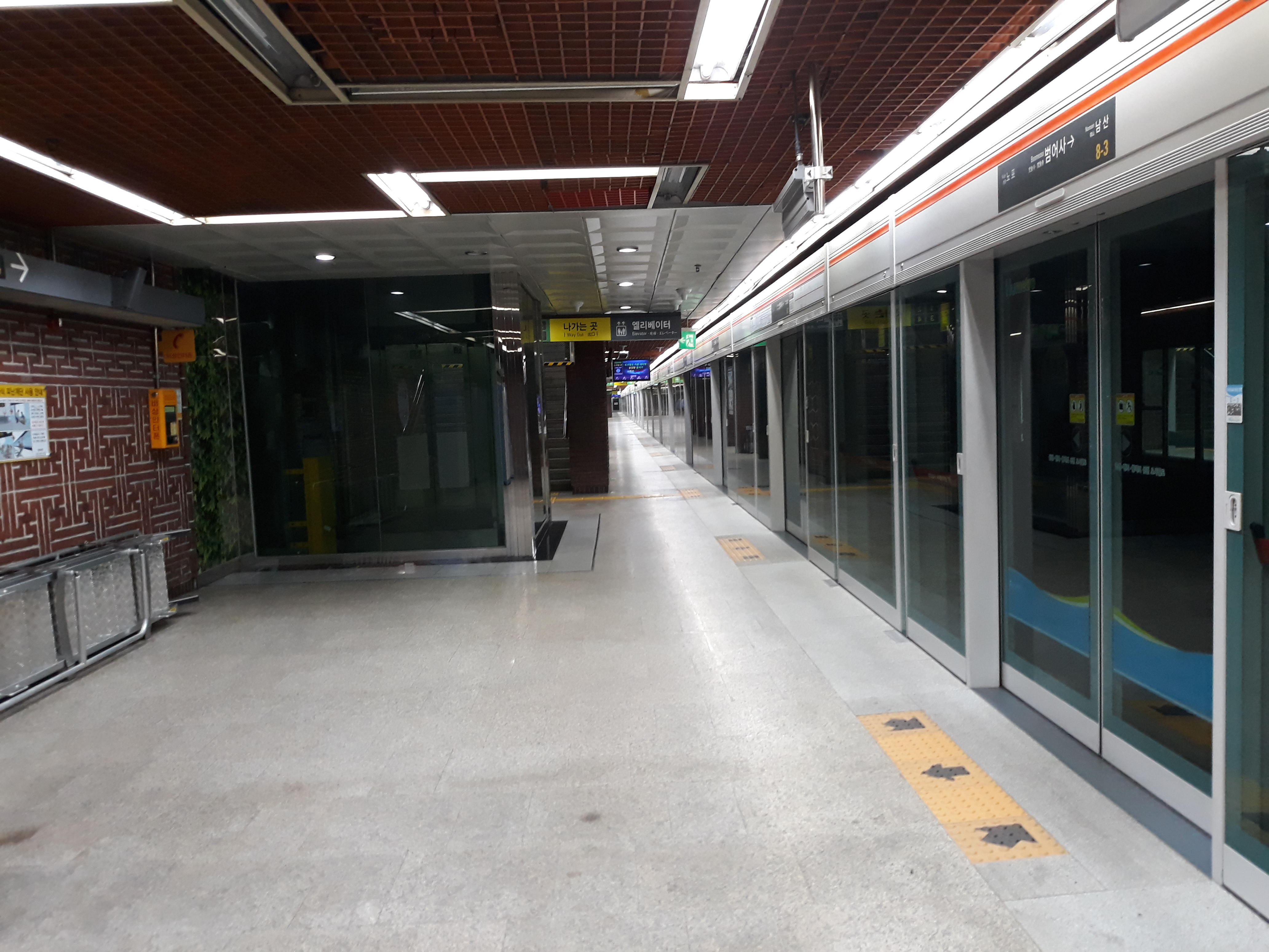 부산 도시철도 1호선 범어사역 다대포해수욕장 방면 승강장